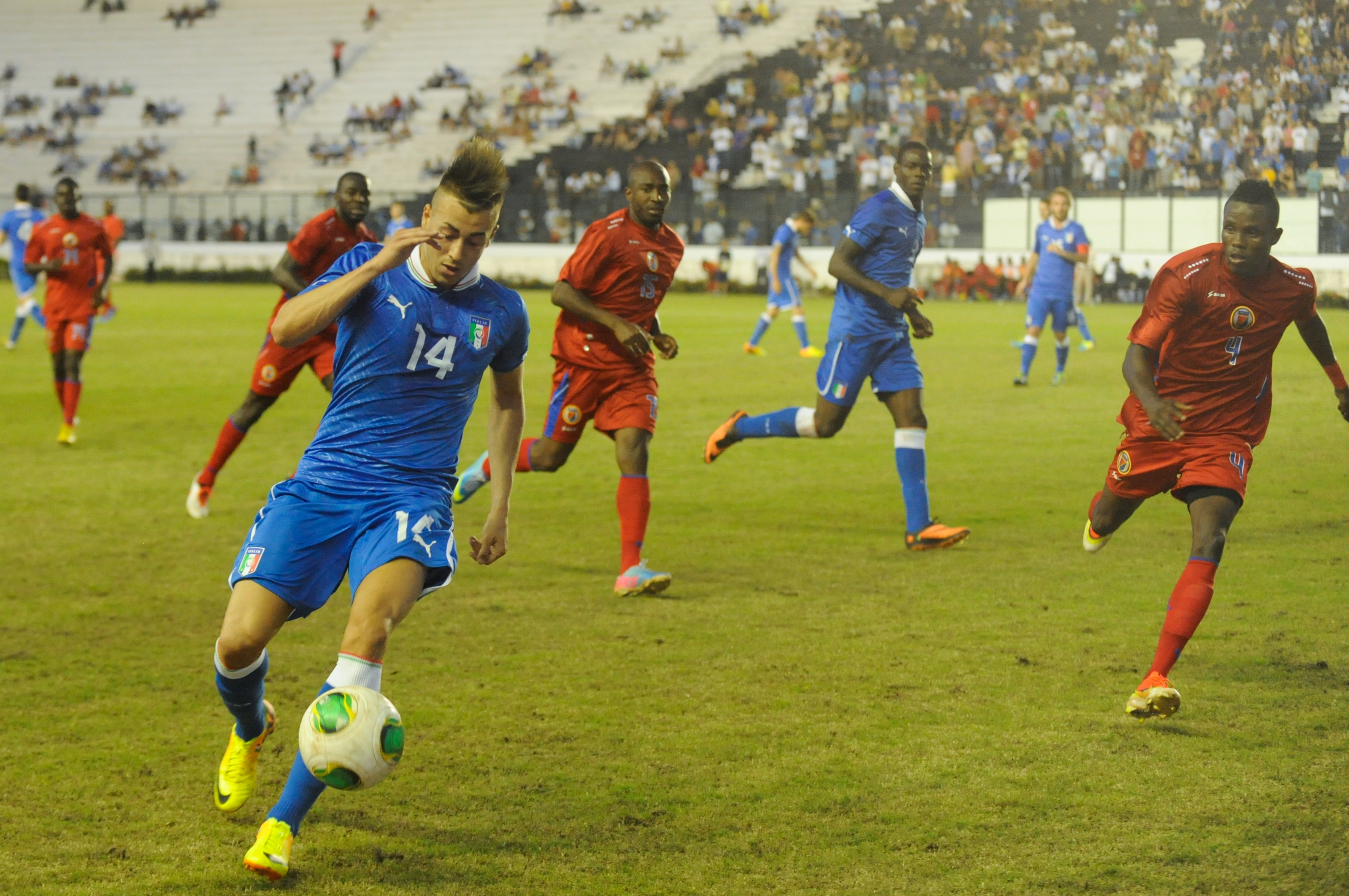 Itália e Haiti fazem amistoso no Estádio São Januário